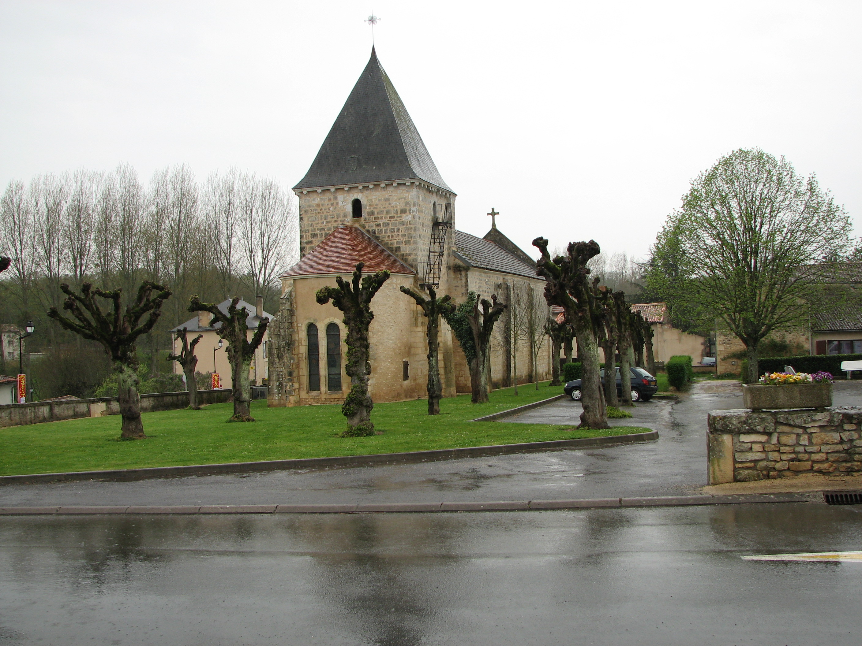 Eglise de Vaux-en-Couhé dans la Vienne Vaux-en-Couhé church in Vienne